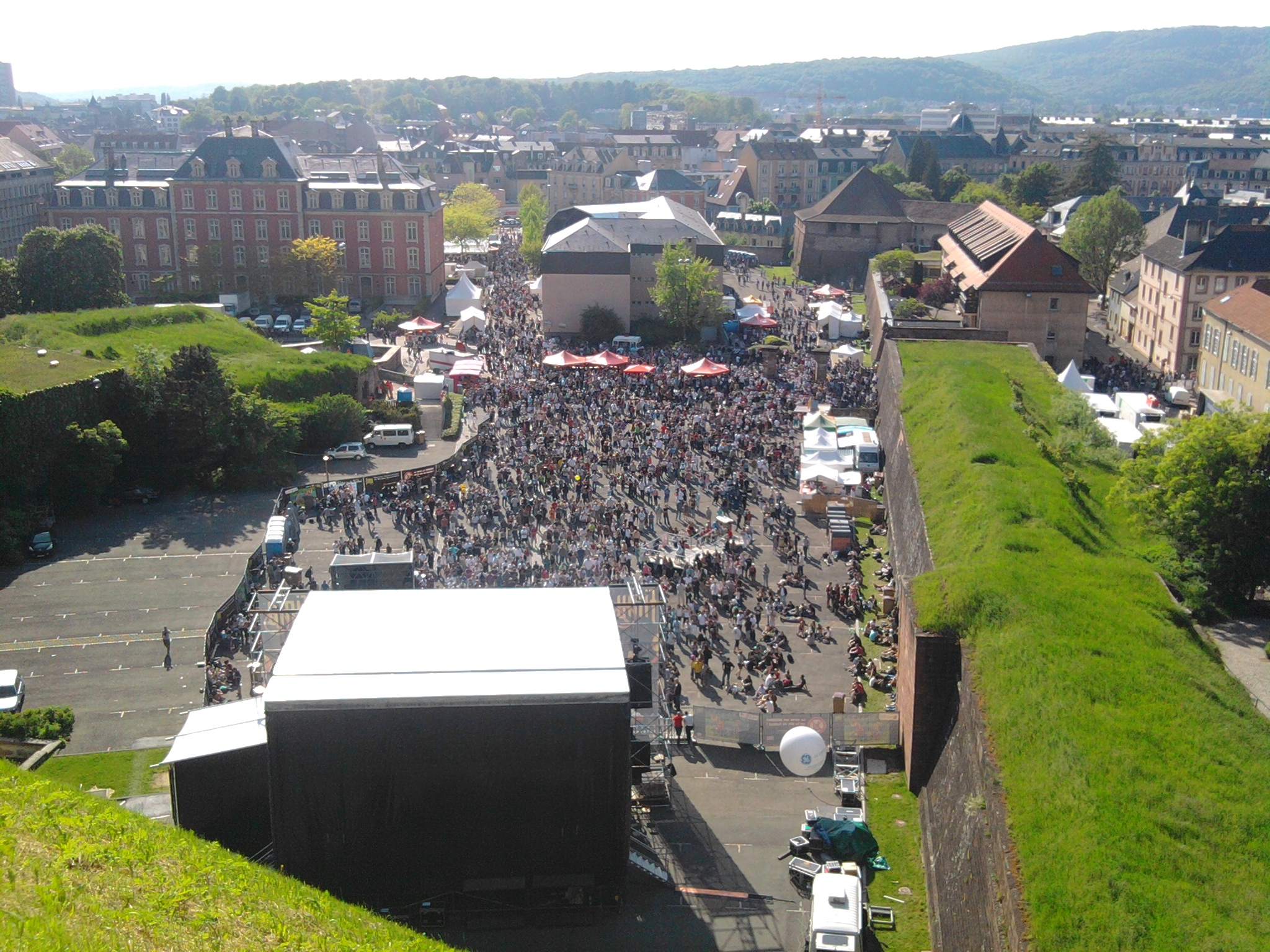 Scène de l'Arsenal vue depuis le Lion de Belfort.